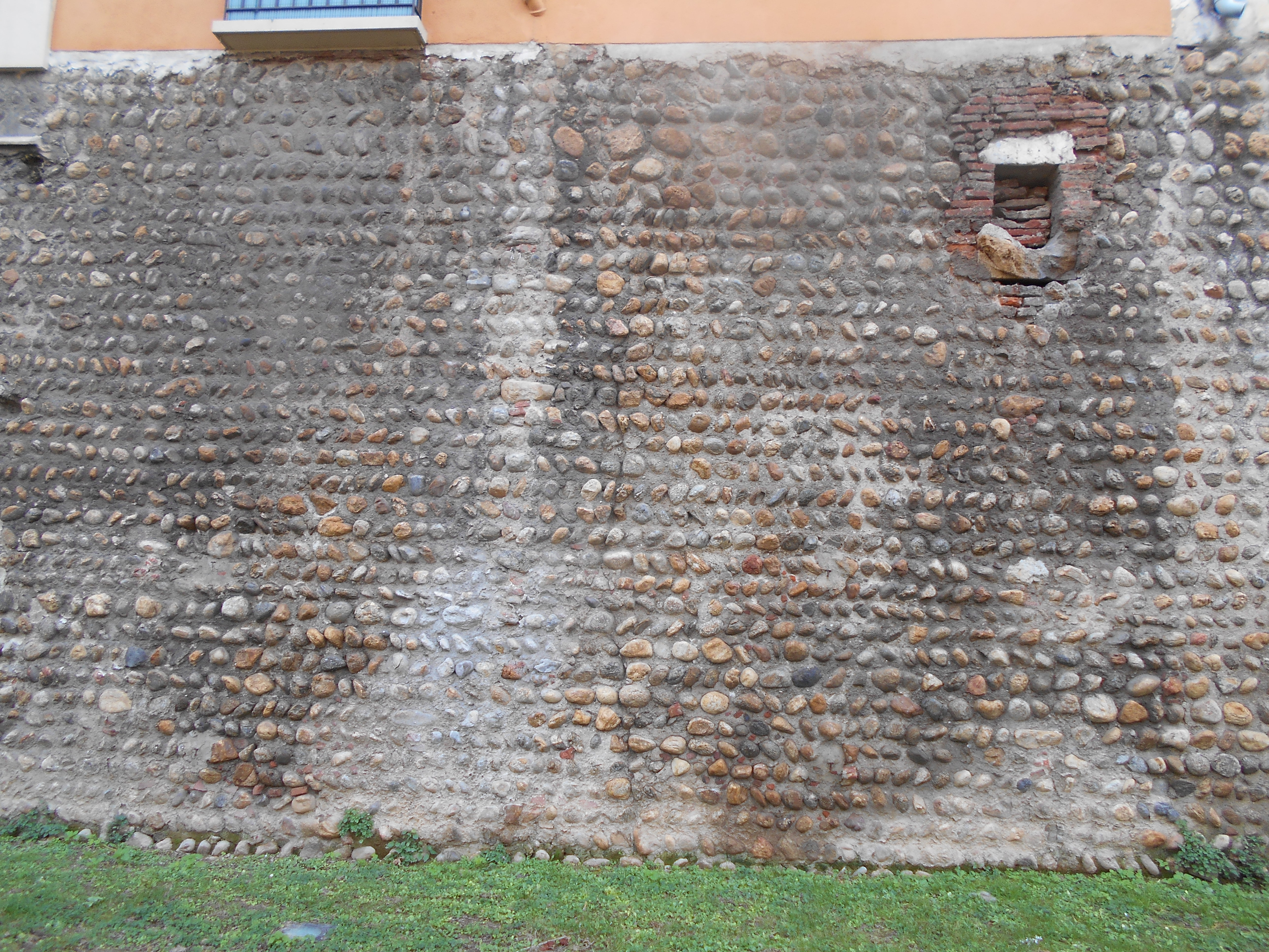 Muralla de Perpinyà de vers el 1300